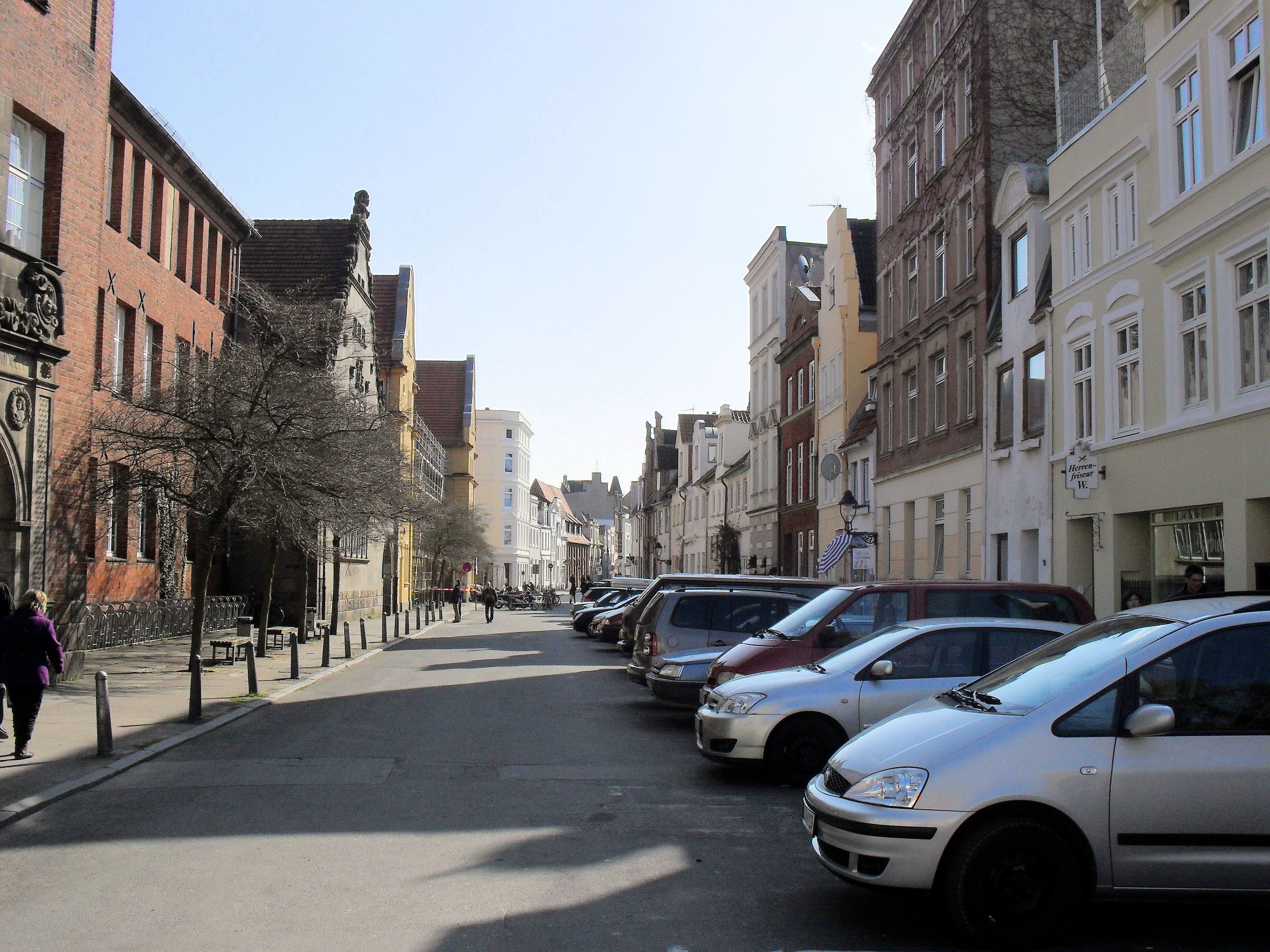 Bei St. Johannis in Lübeck